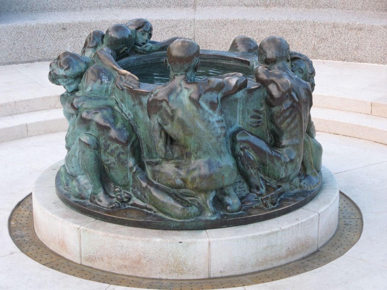 Zdenac života Ivana Meštrovića iz 1905. godine u Zagrebu